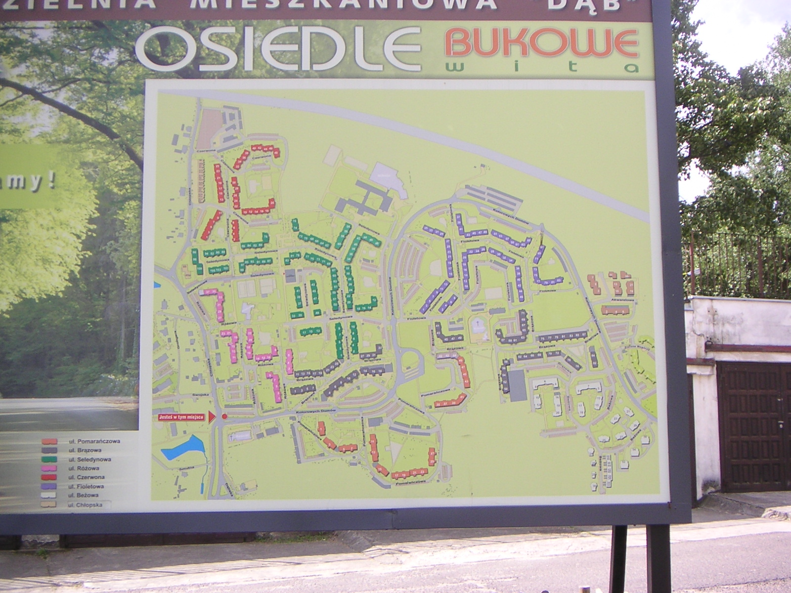 Szczecin-Bukowe, plan osiedla